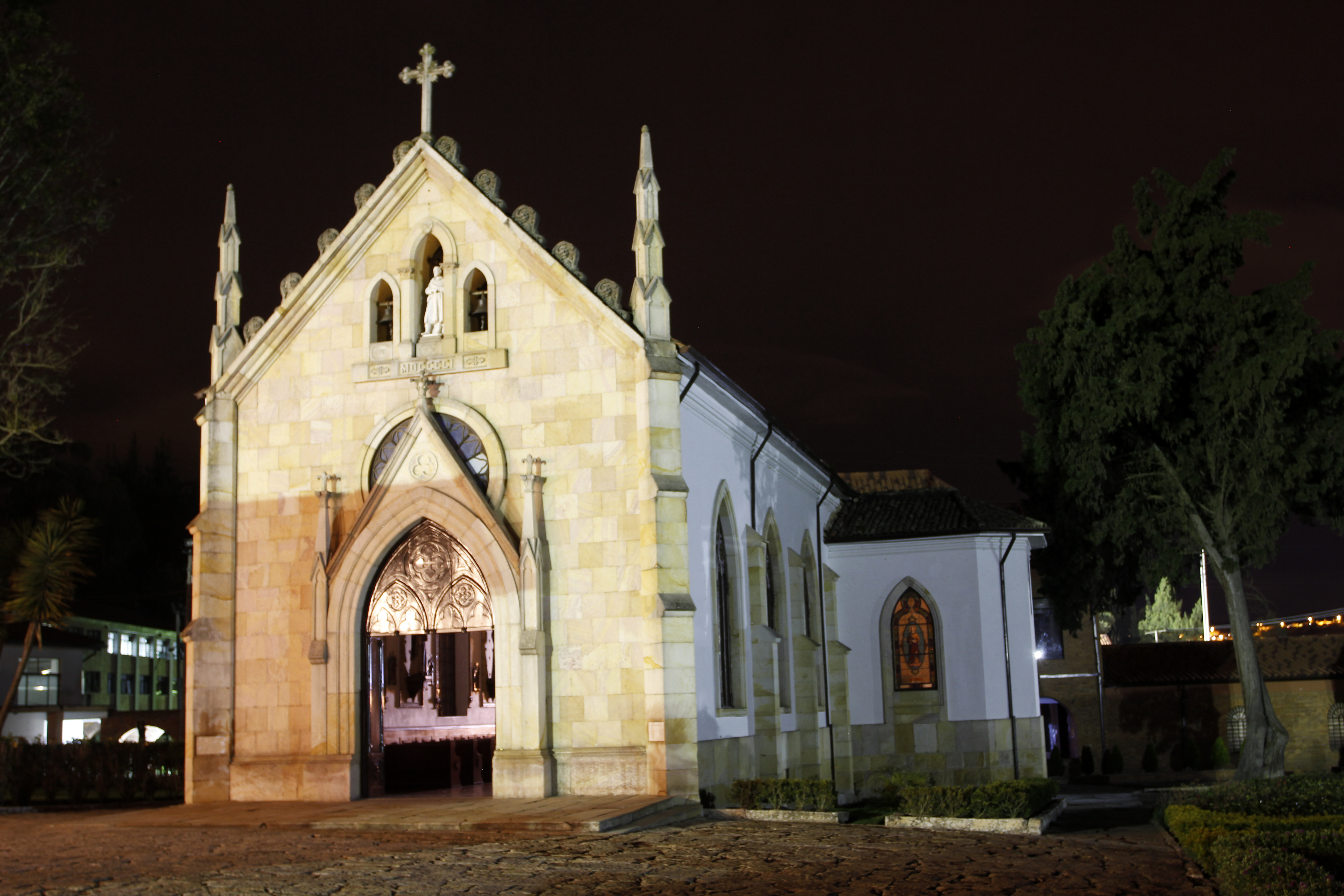 Iglesia